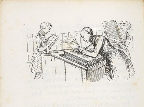 Physiology of clerks -H de Balzac 1841 -vignette from Tremoulet